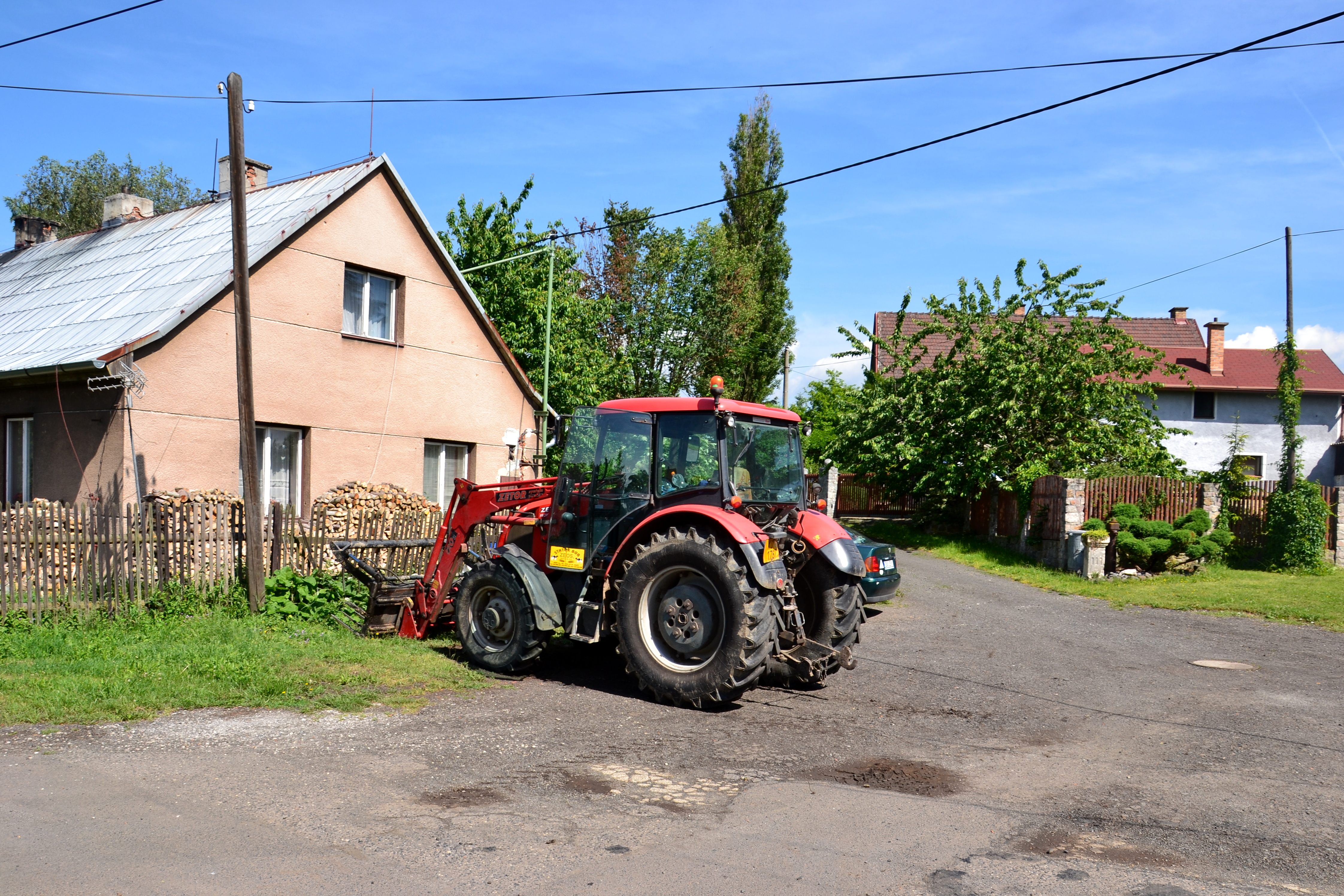 Domy u návsi